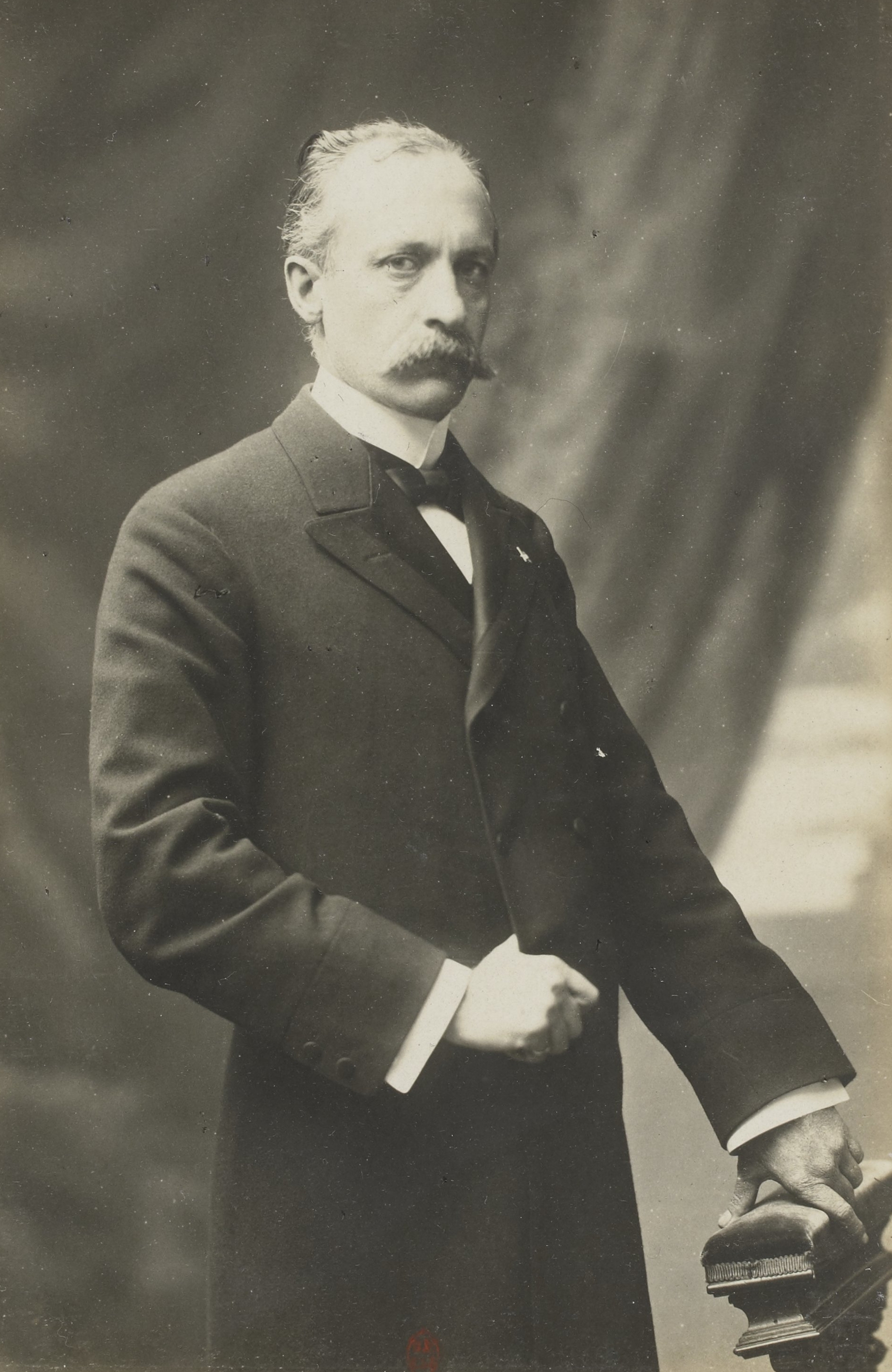 Exposition universelle de 1900 : portrait de Ferdinand Wythe Peck.